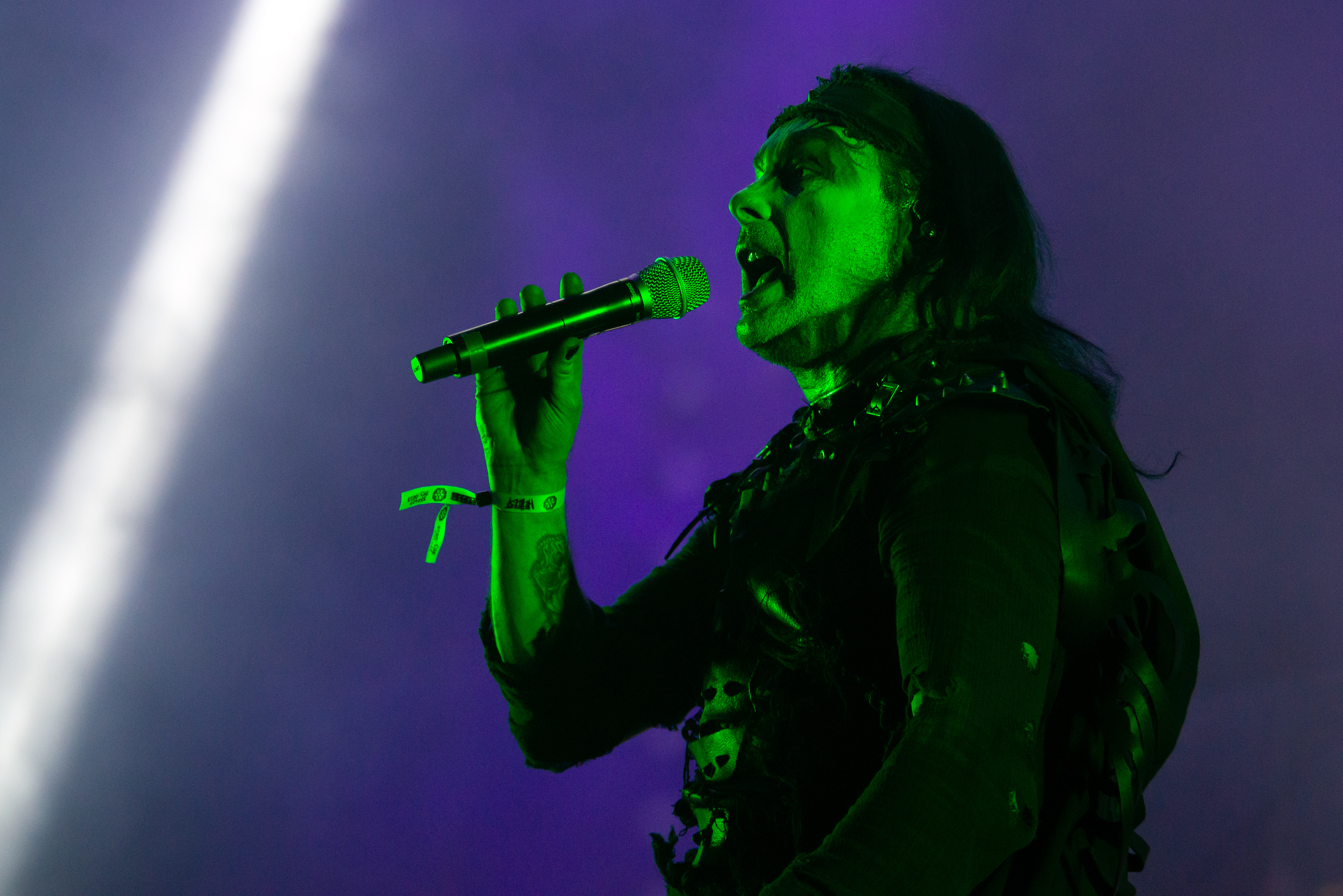 Concert du groupe britannique Cradle of Filth au Hellfest 2019.